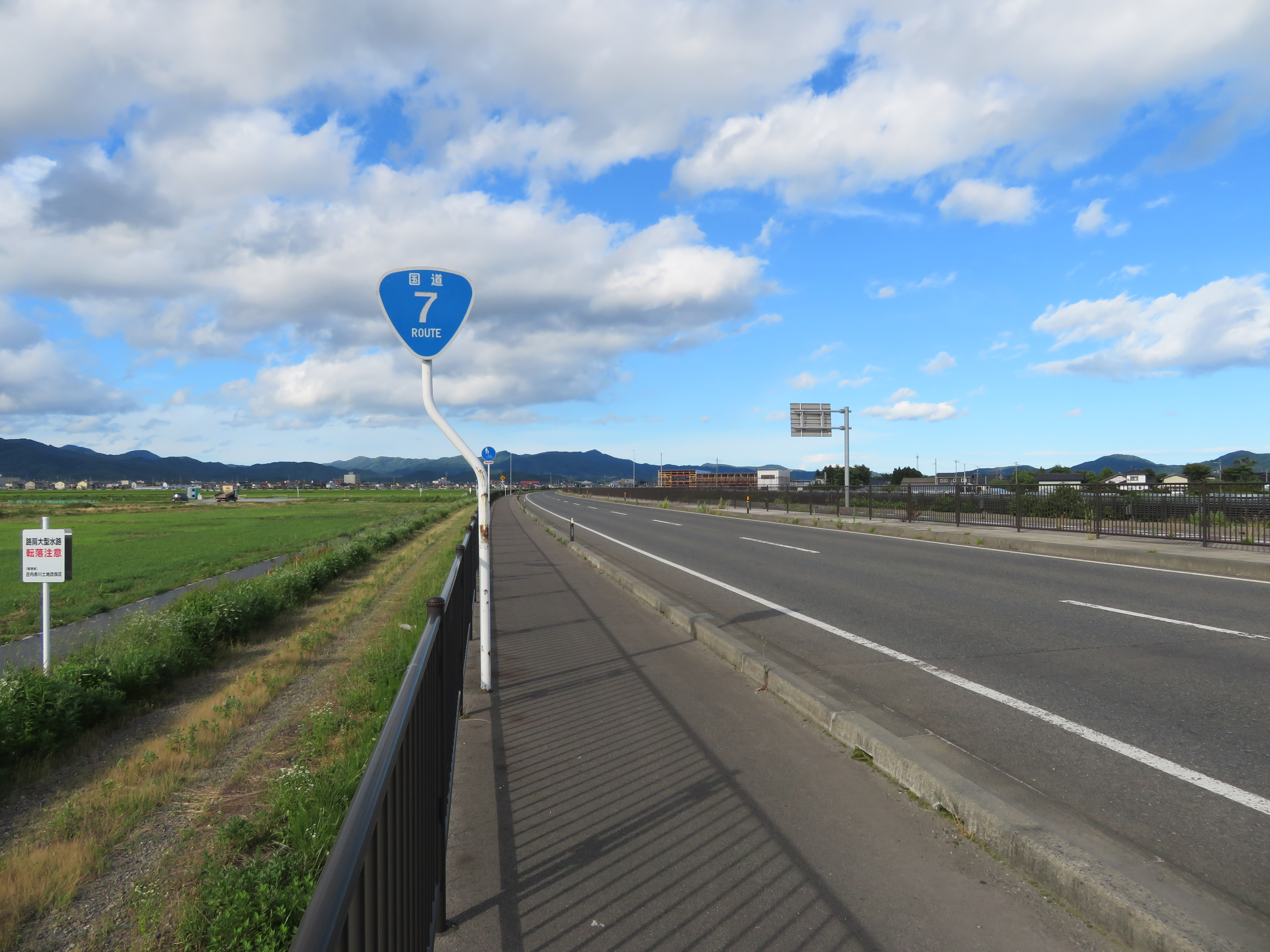 国道7号線鶴岡バイパス山形県鶴岡市覚岸寺付近（村上方面を撮影） Canon PowerShot SX720 HS